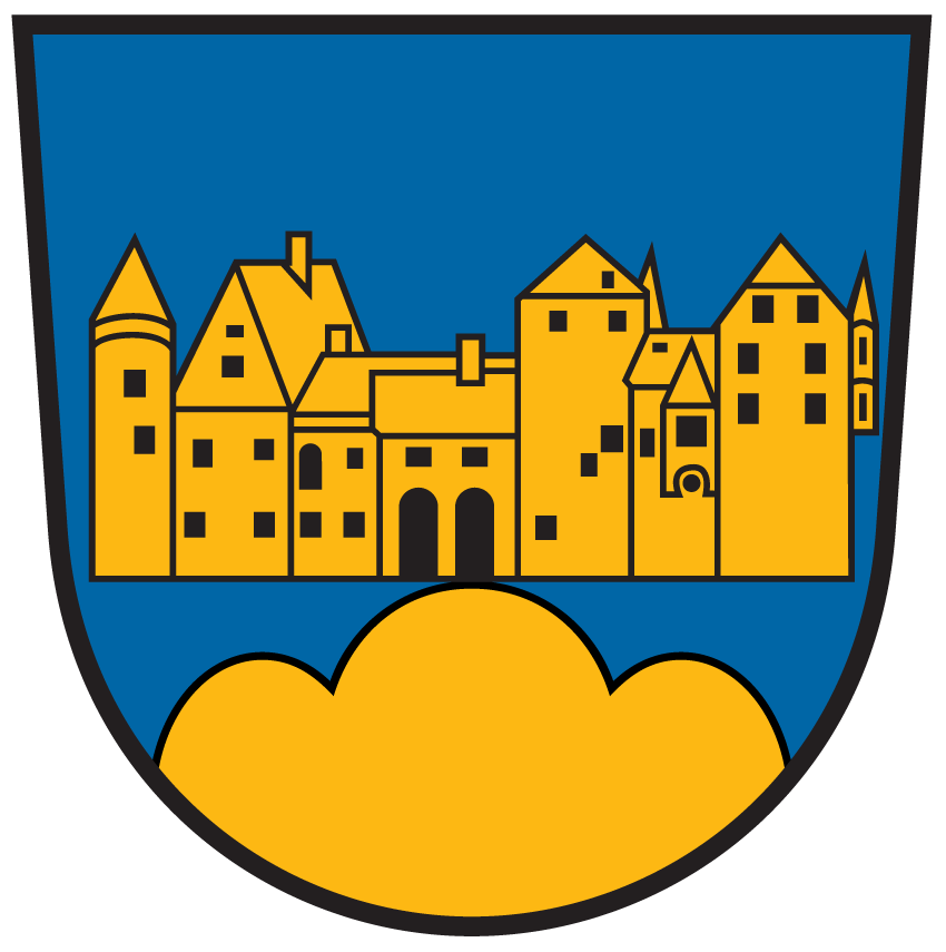 Wappen von Frauenstein